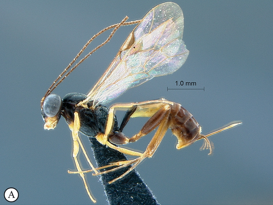 Schlupfwespe, Unterfamilie Cremastinae, Habitus von Pristomerus mbaka, aus Südafrika, von seitlich aus der Originalbeschreibung